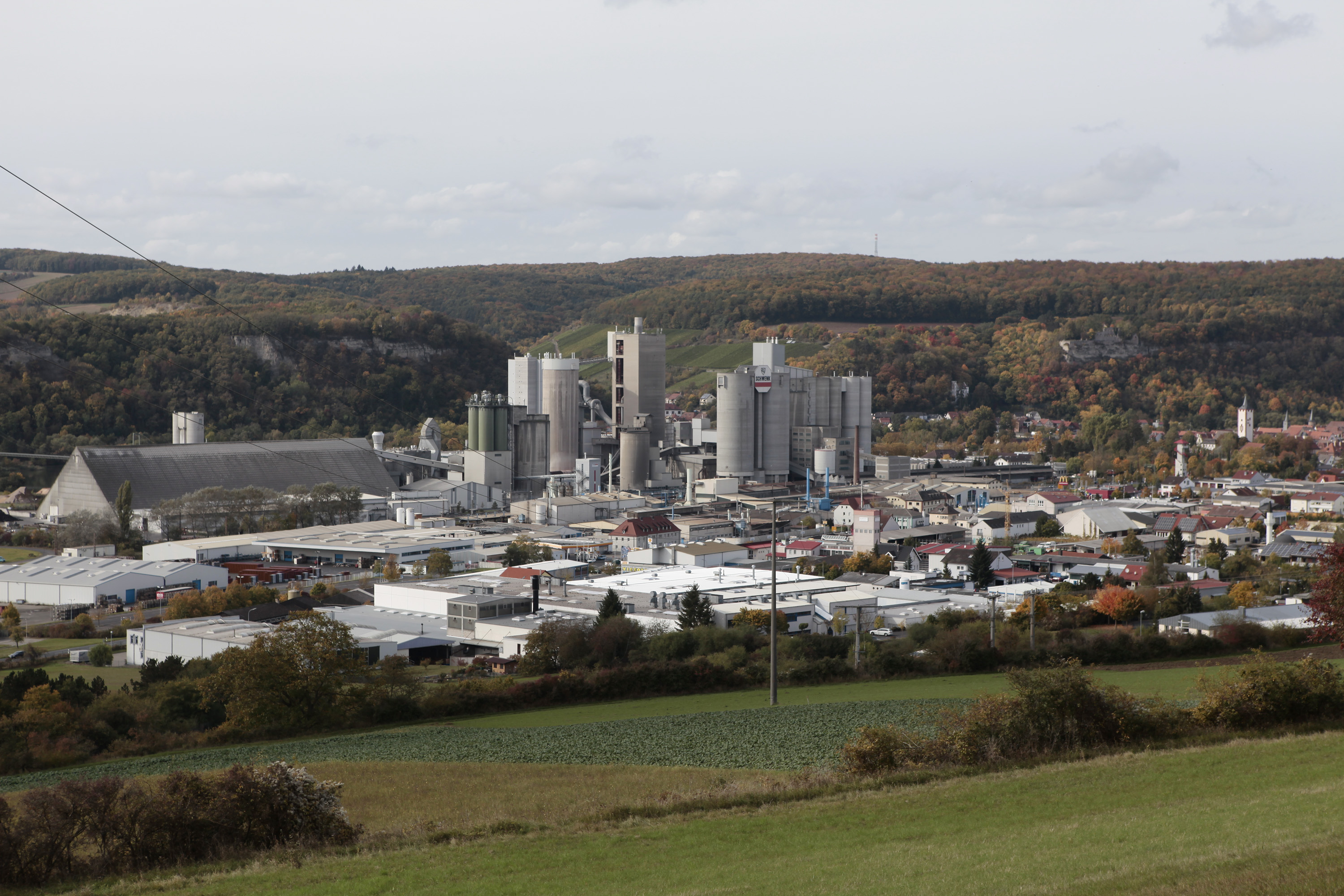 Blick auf das Zementwerk aus Richtung Gewerbegebiet am Steinlein (oberhalb)